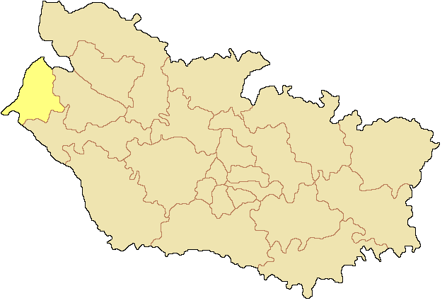 Canton de Friville-Escarbotin dans le département de la Somme